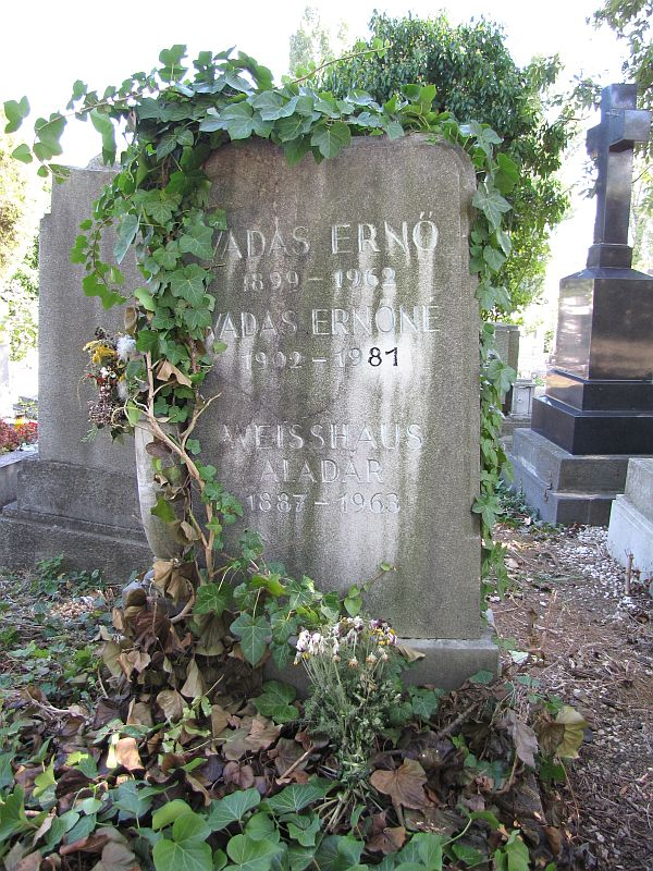 Vadas Ernő (Nagykanizsa, 1899. december 17.–Budapest, 1962. május 30.)fotóművész sírja Budapesten. Farkasréti temető: 46/6-1-18.